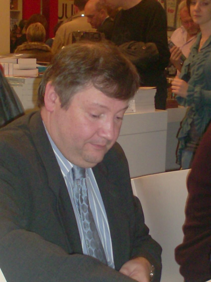 Foto van Paul D'Hoore op de Boekenbeurs 2010